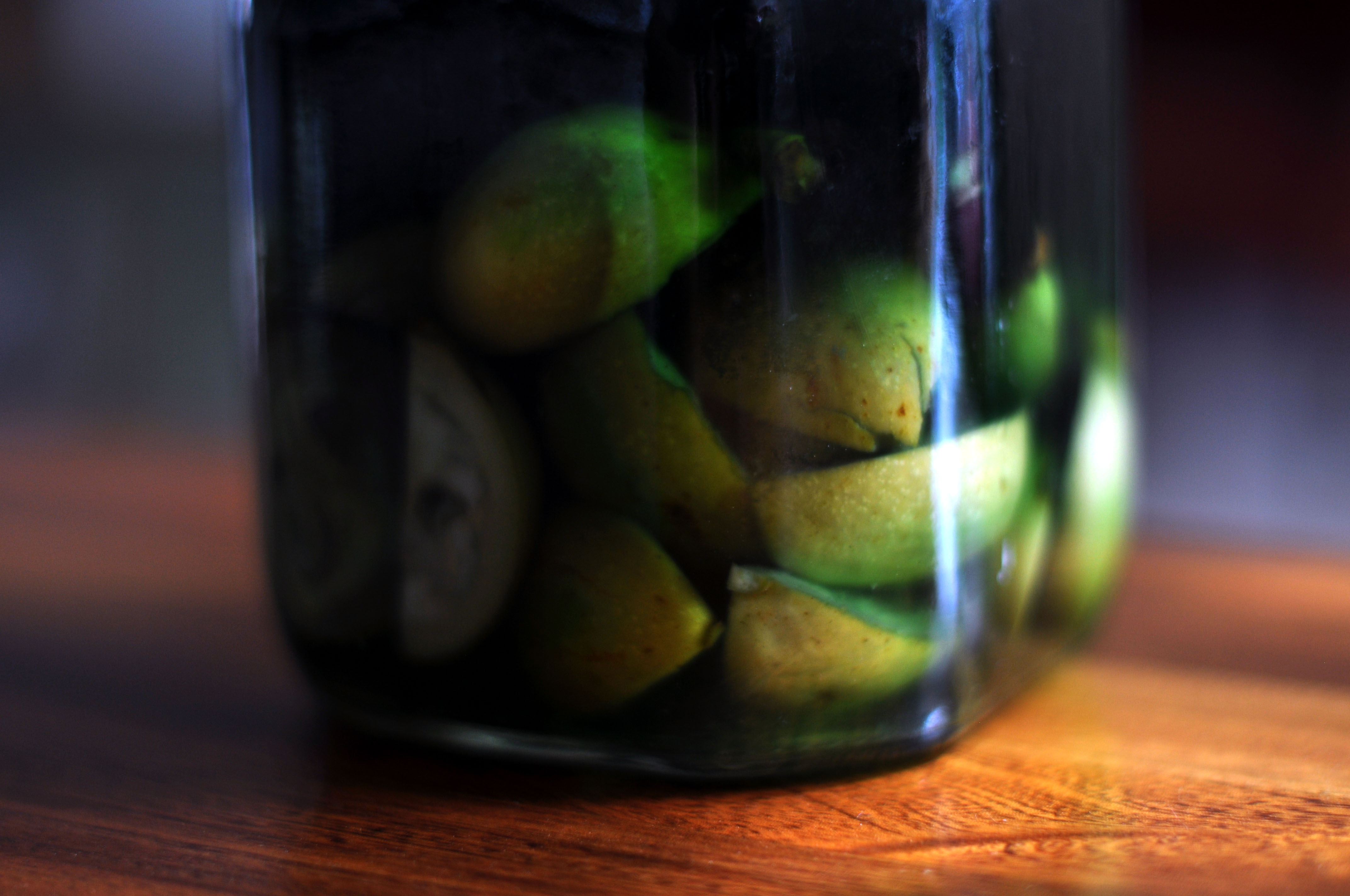 Valnøddesnaps (Walnut schnaps)